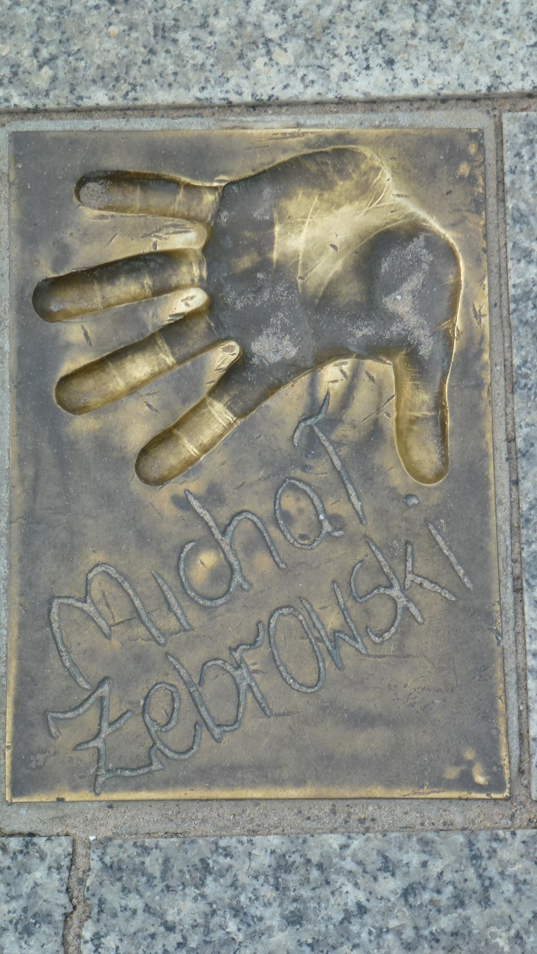 Odcisk gwiazdy na ul. Aleji Gwiazd w Międzyzdrojach woj. zachodniopomorskie pow. kamieński